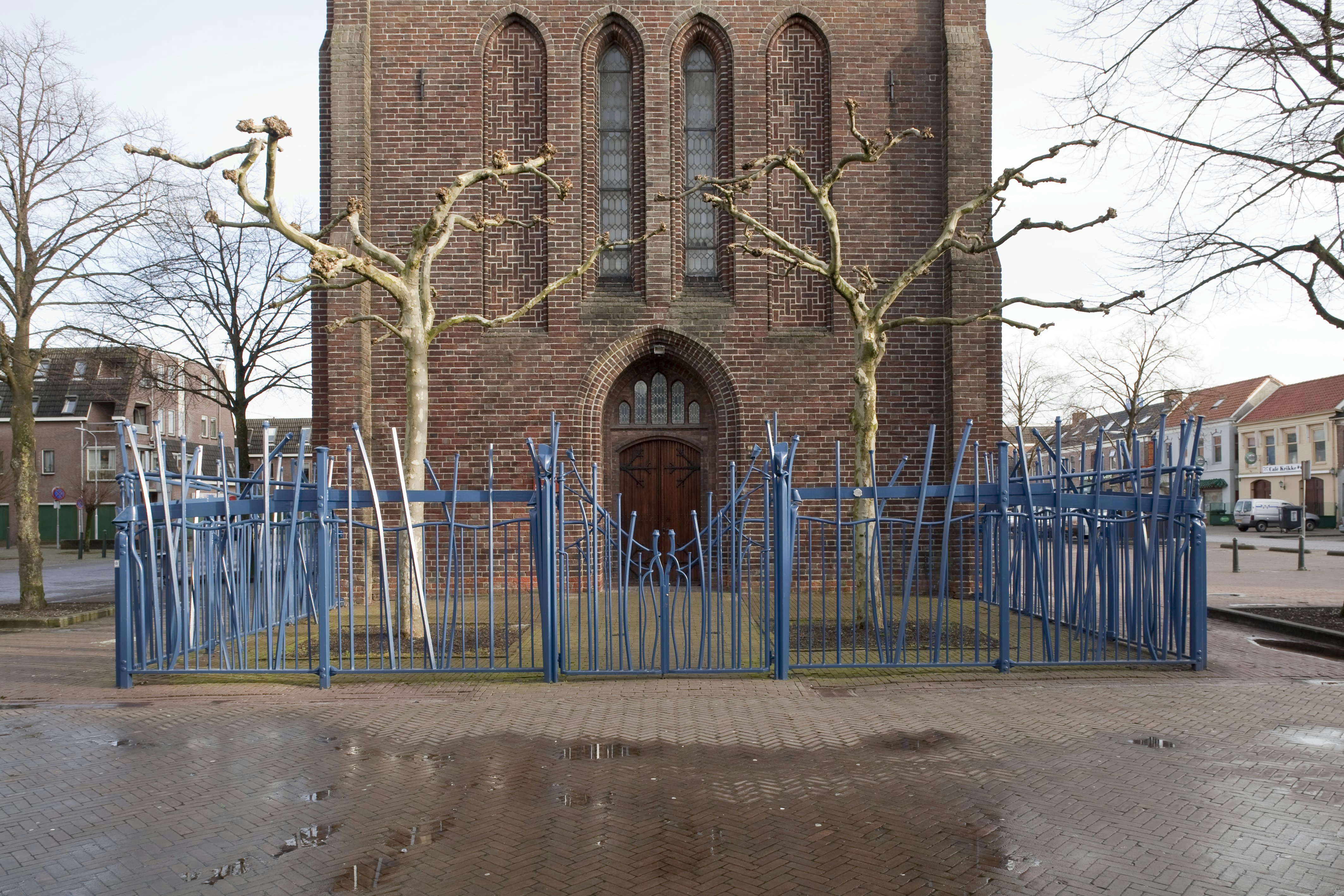 Nederlands Hervormde Kerk: Detail, het moderne felblauw gekleurde hekwerk met de twee leibomen voor de westgevel, frontaal gezien